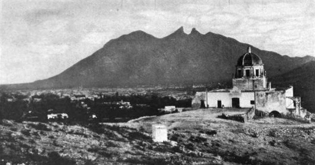 Monterrey between the bishop´s palace and saddle Mountain Estas fotos pertenecen al libro de Elizabeth Visere McGary “An American Girl in Mexico” Publicado por Dodd, Mead and company, 1904 en Nueva York. El libro y sus imágenes son del dominio público en USA por haber expirado su copyright después de 100 años. En el libro la autora relata sus impresiones de un viaje que hace a México, especialmente a Monterrey en donde permanece por casi un año. Ella está unos días en Saltillo, una semana en San Luis Potosí y unos tres meses en Ciudad de México. El enlace a este libro es: “…the Bishop's Palace, a grand old historic building, with its secret entrances and exits and blood spattered walls, to which the guide points with horror depicted on his face, though on close examination the spots look strangely like splotches of red paint. The walls had thousands of names carved on their dingy surfaces—names of people from every land—some carved many, many years ago. It is a long steep ascent from the car line to the top of the hill, but this climb is made on burros, which may be hired at the foot of the mountain.” “…el obispado, un edificio antiguo y grande, con salidas y entradas secretas y sangre salpicada en sus paredes que eran señaladas por el guía con horror descrito en su rostro, aunque examinándolas de cerca, las manchas parecen como extraños salpicones de pintura roja. Las paredes tenían miles de nombres grabados en su desgastada superficie –nombre de gente de todas partes- algunos grabados muchos, muchos años atrás. Es un largo tramo cuesta arriba desde la carretera hasta la cima del monte, pero esta cuesta se hace mediante burros que pueden ser contratados al pie de la montaña.